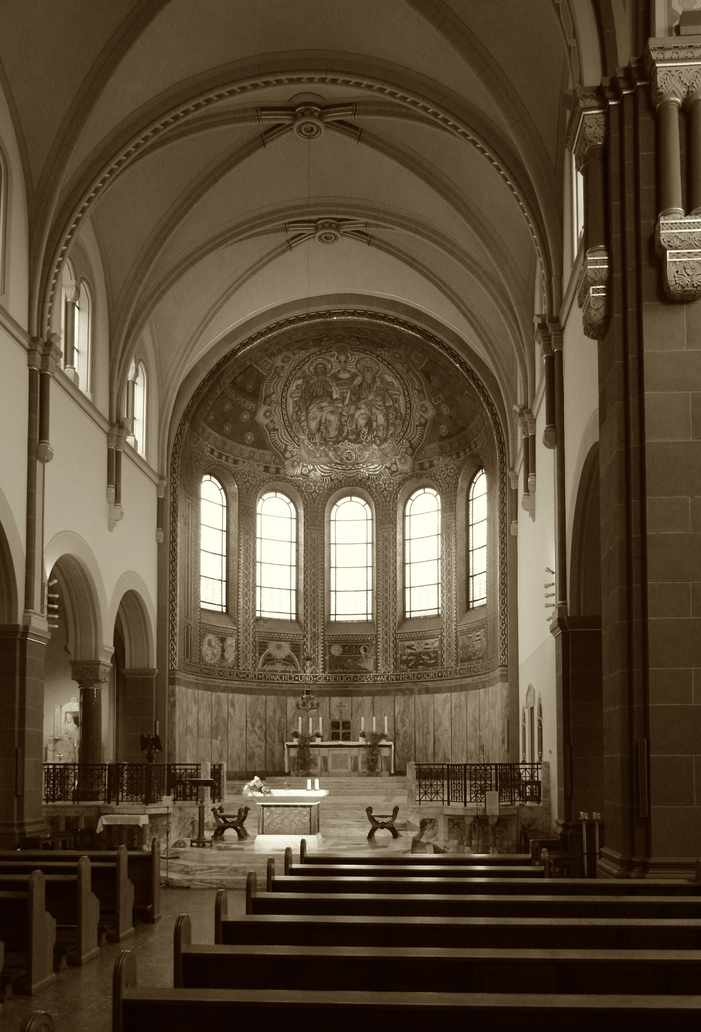 Hauptschiff der Herz-Jesu-Kirche in Aachen-Burtscheid